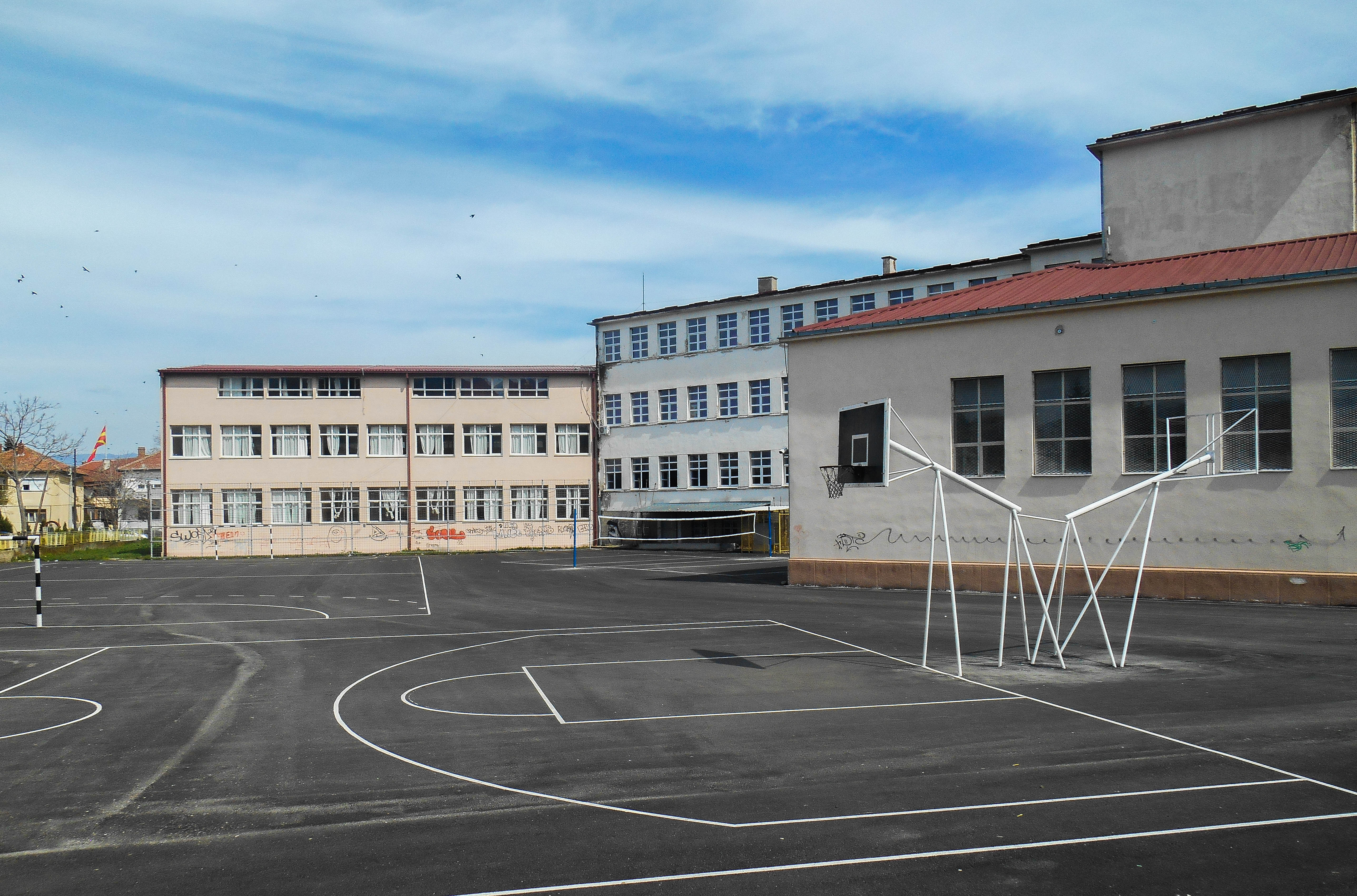 Училиште Јане Сандански